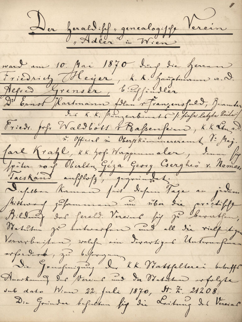 Eintrag im Protokollbuch 1870 zur Gründung der Heraldischen Gesellschaft Adler